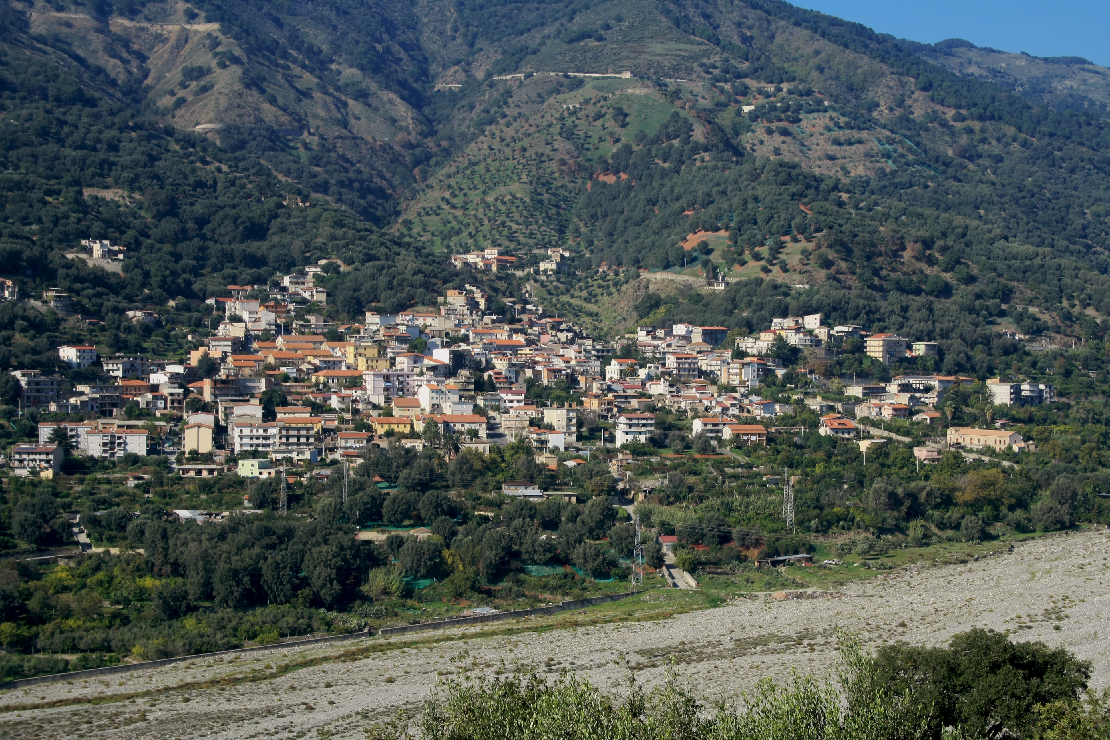 Centro abitato di Bagaladi - Calabria (Italy)